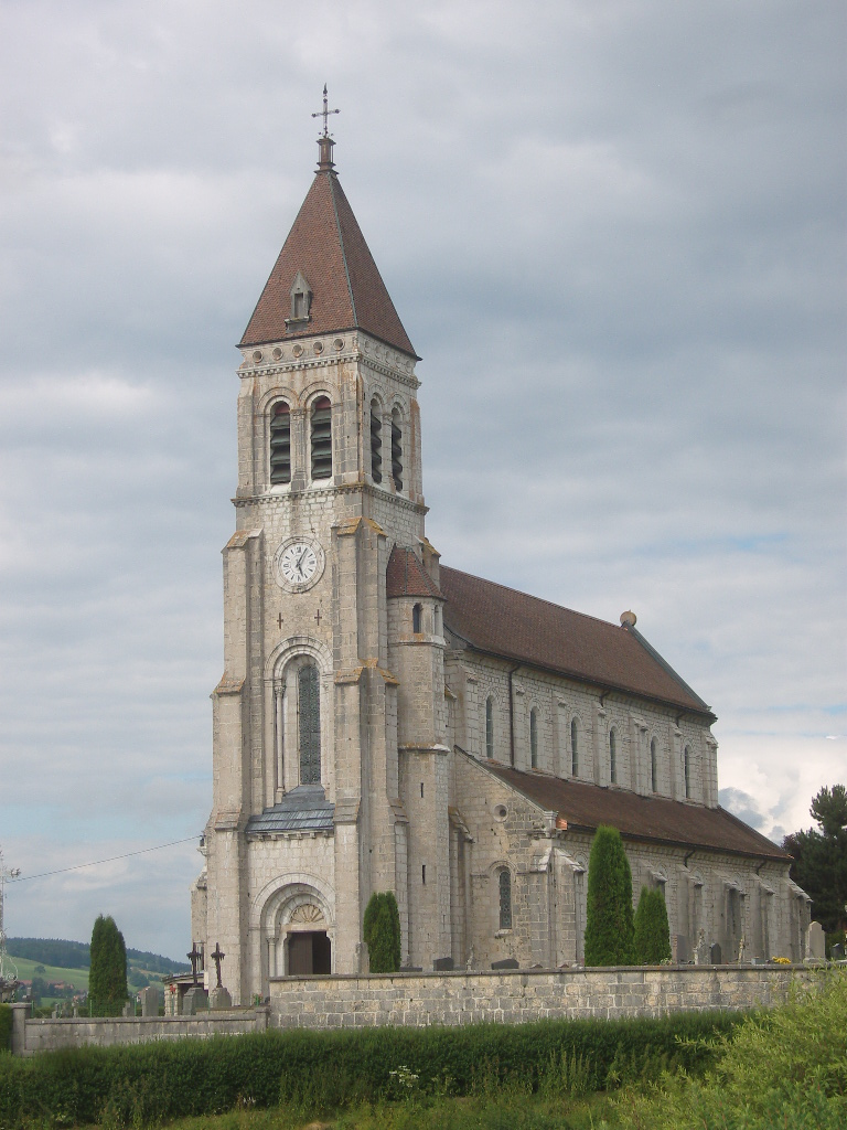 Longevilles-Mont d'Or, église paroissiale Saint-Sylvestre (extérieur)